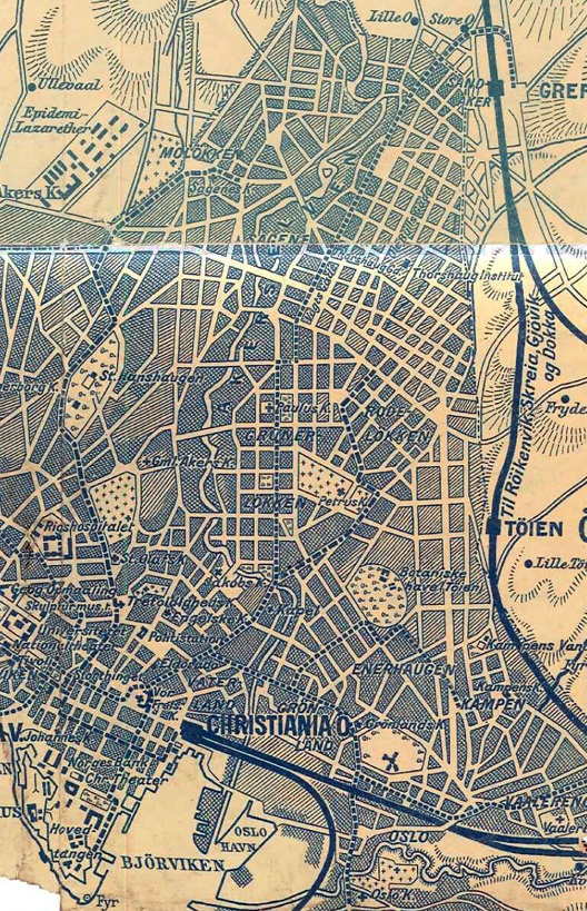 Gammelt sporveiskart som viser linjene til Sagene, Rodeløkka og Grefsen.